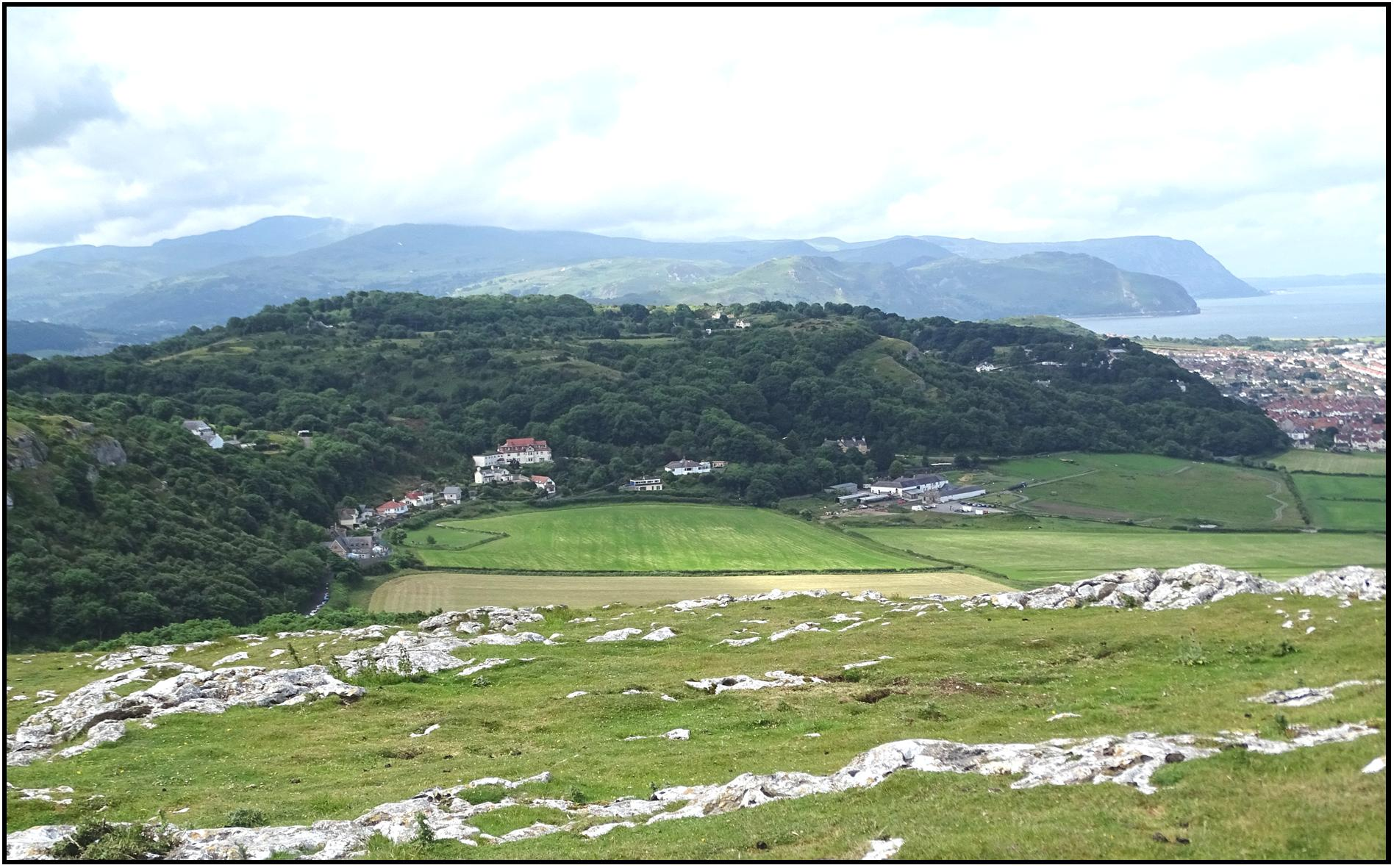 Delwedd o ardal Nant y Gamar ger Llandudno aadwaenir fel Mynydd Gloddaeth